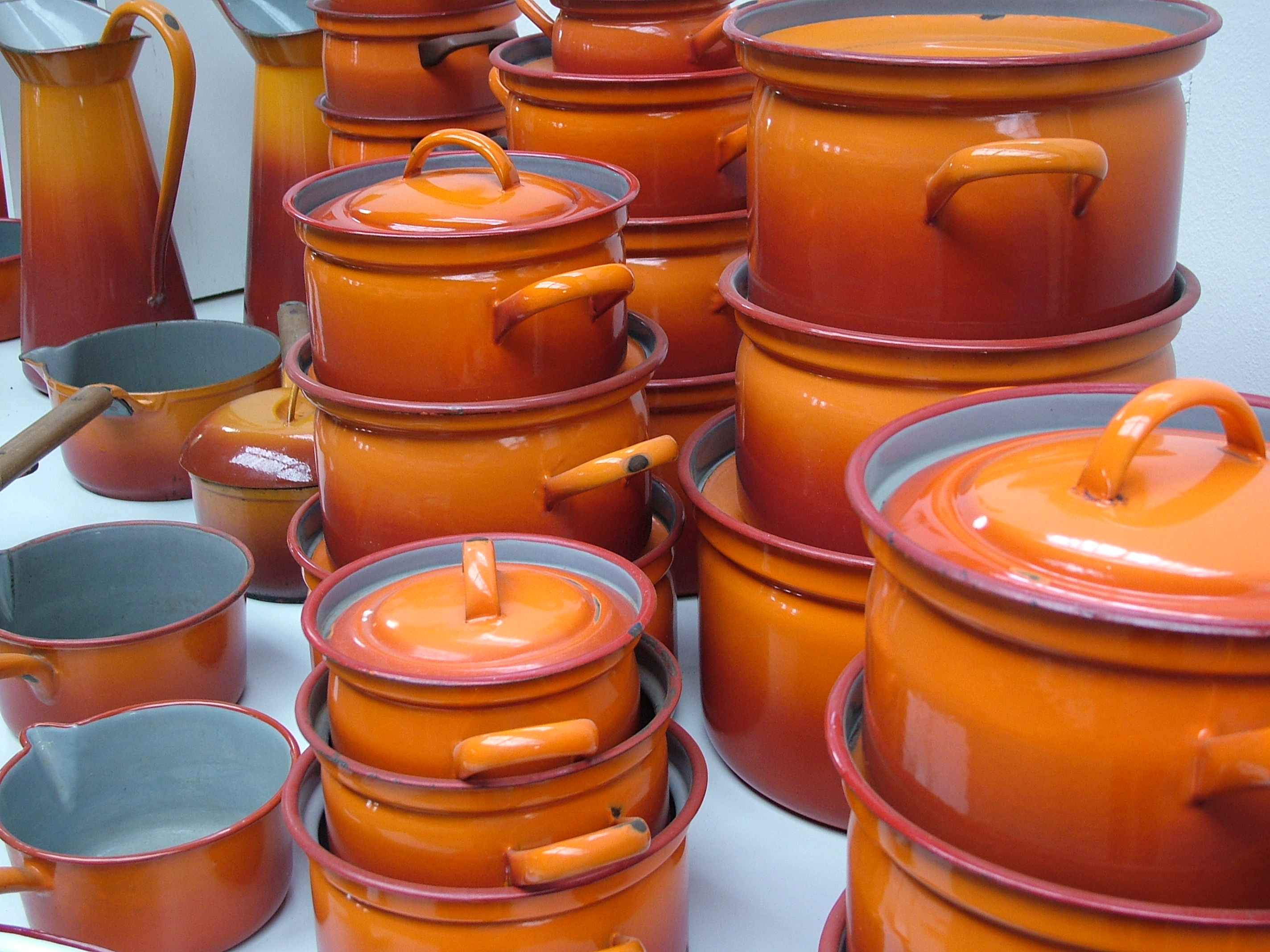 Email, DRU.